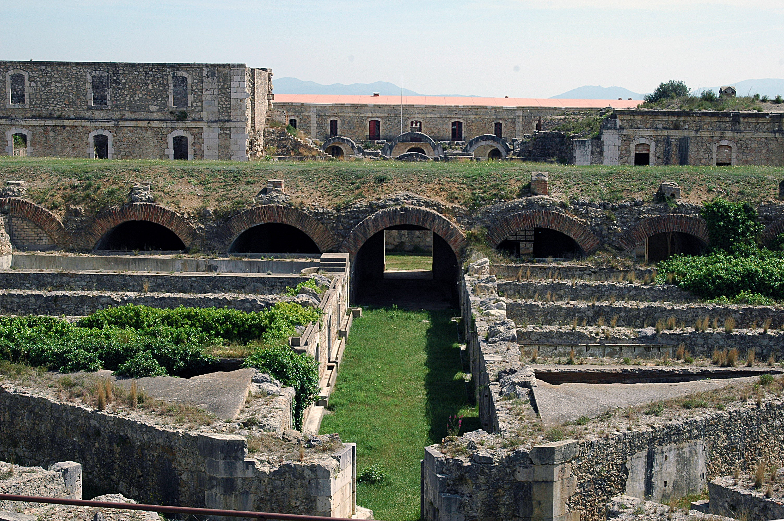 Castell de Sant Ferran (Figueres)